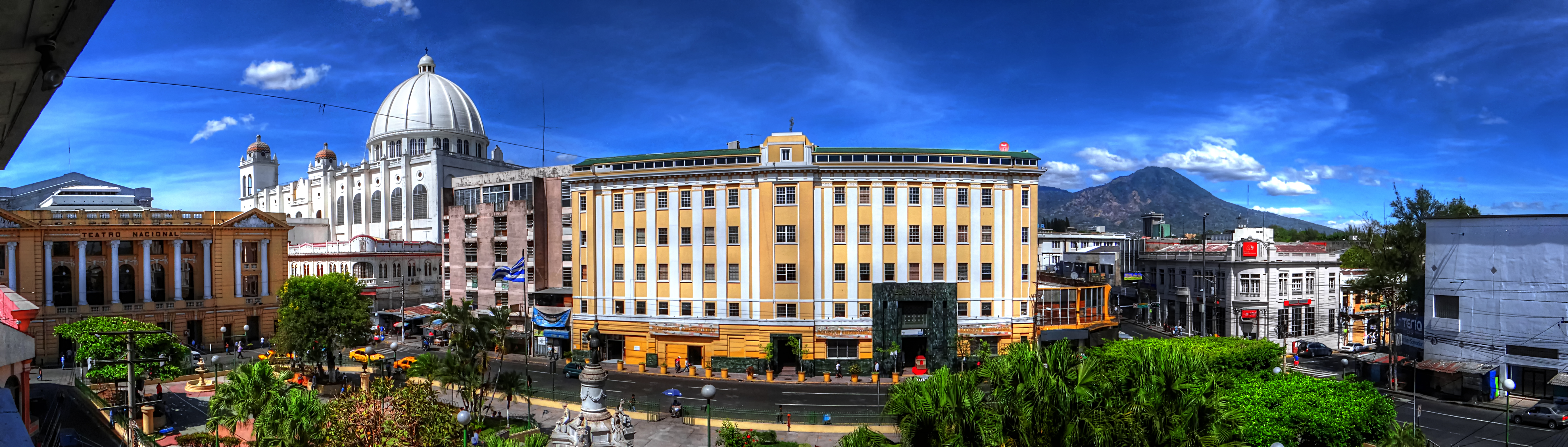 Panorámica del centro histórico de San Salvador alrededores de el parque Morazan y Teatro Nacional al fondo ala derecha la cúpula de Catedral metropolitana.